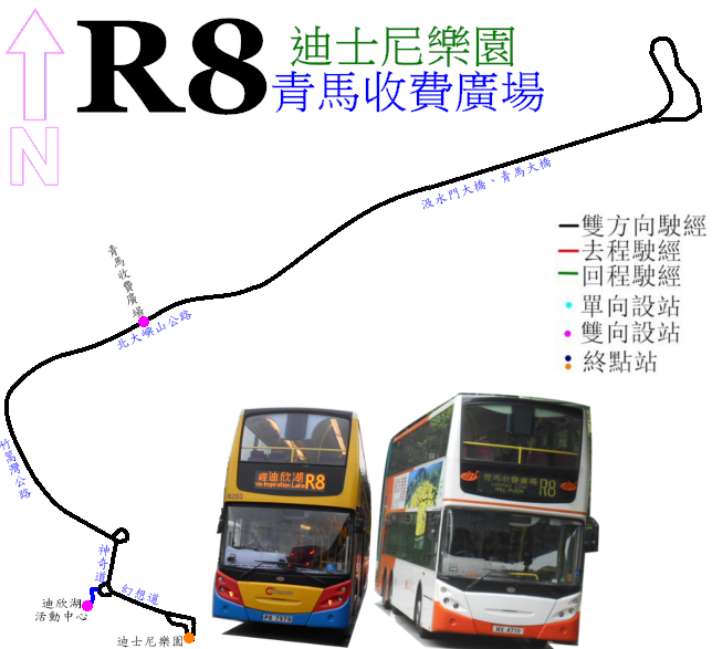 中文（香港）: 迪士尼巴士R8線的走線圖